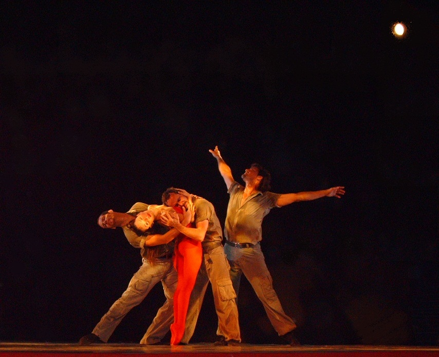 Ballet Nuevo Mundo de Caracas. "Hasta la victoria siempre", coreografía de Zhandra Rodríguez. Septiembre de 2011.